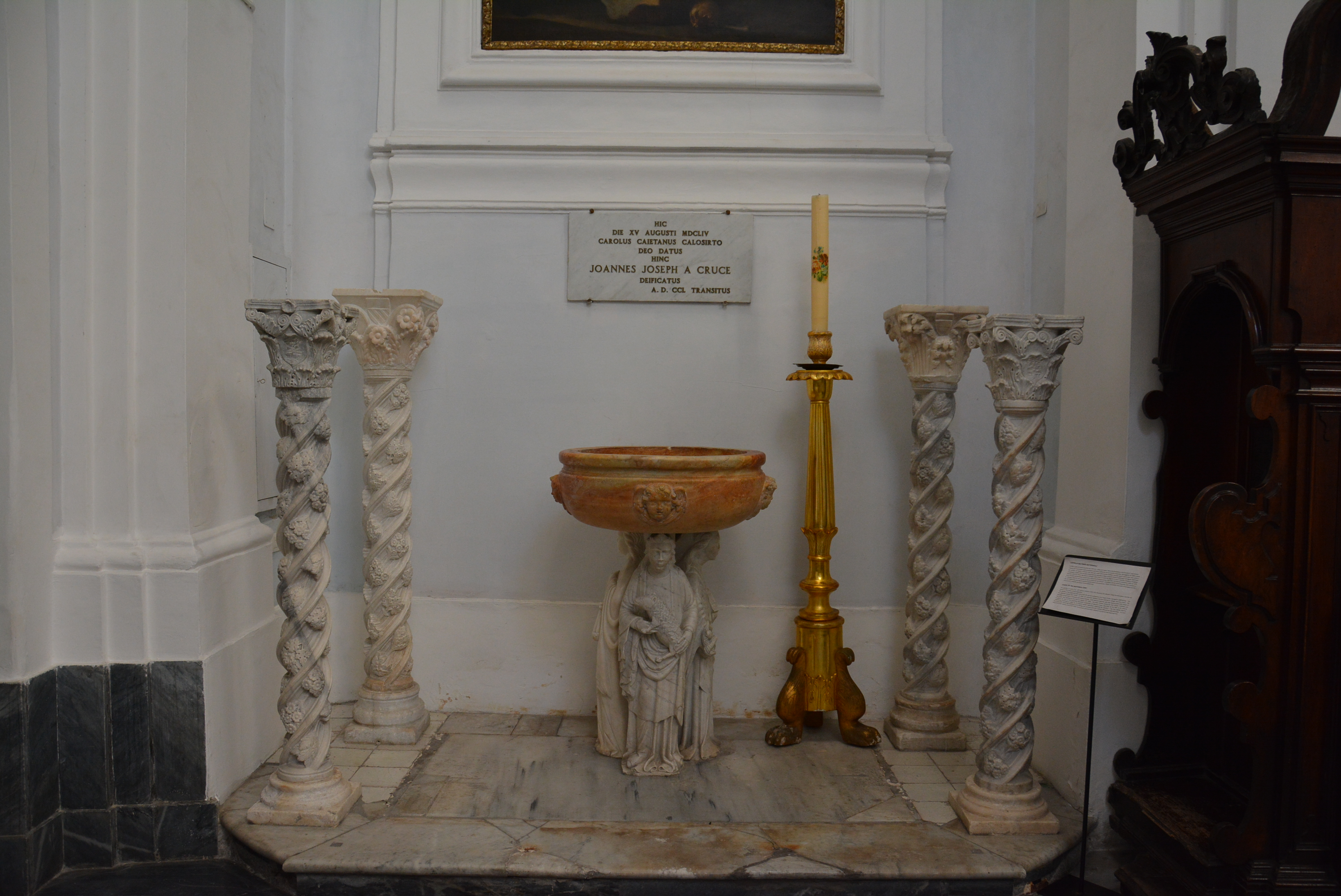 Cattedrale di Santa Maria Assunta a Ischia